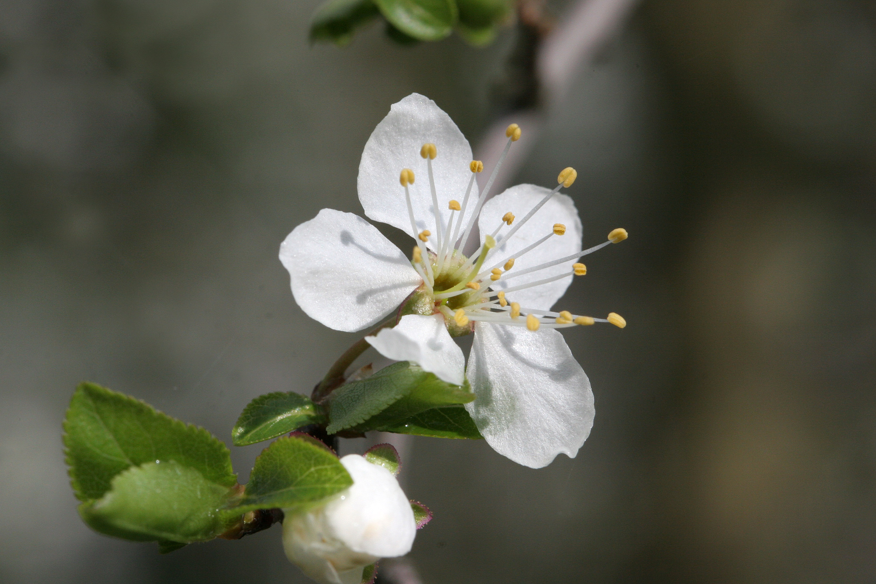 Mirabellenblüte (Prunus insititia)